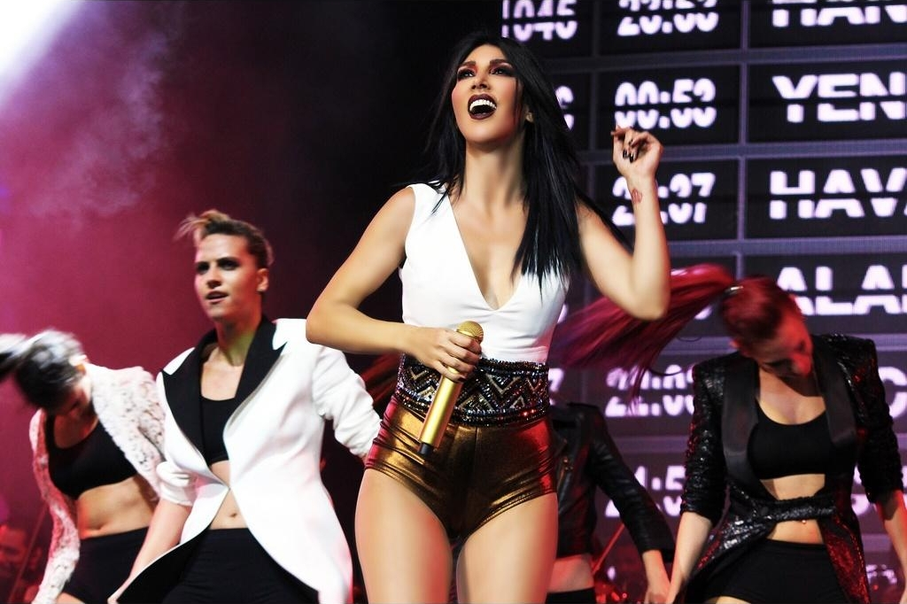 Hande Yener, Harbiye Cemil Topuzlu Açıkhava Tiyatrosu'nda sahnede "Havaalanı" şarkısını seslendirirken.